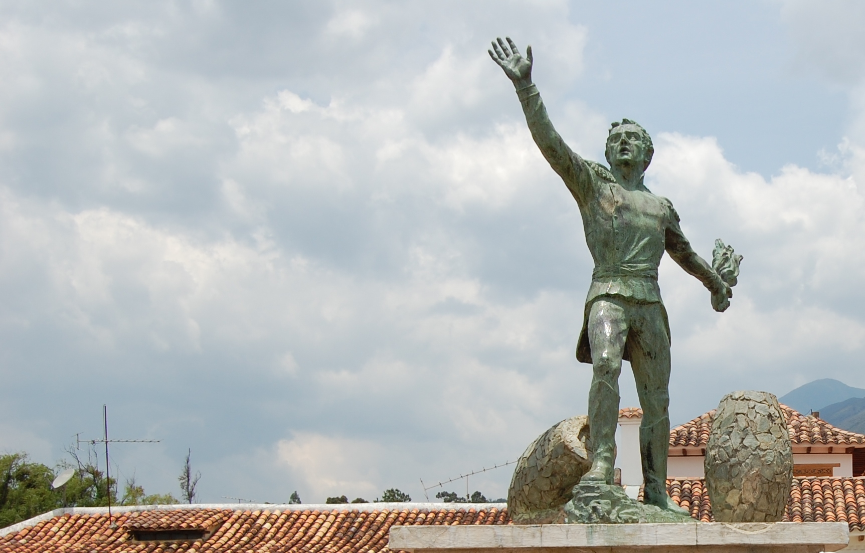 Estatua que se encuentra en el municipio de Villa de Leyva, Boyacá, Colombia, lugar de nacimiento de Antonio Ricaurte, en la que el Estado Venezolano rinde honor a Antonio Ricaurte, está situada en frente de la casa donde nació éste procer .